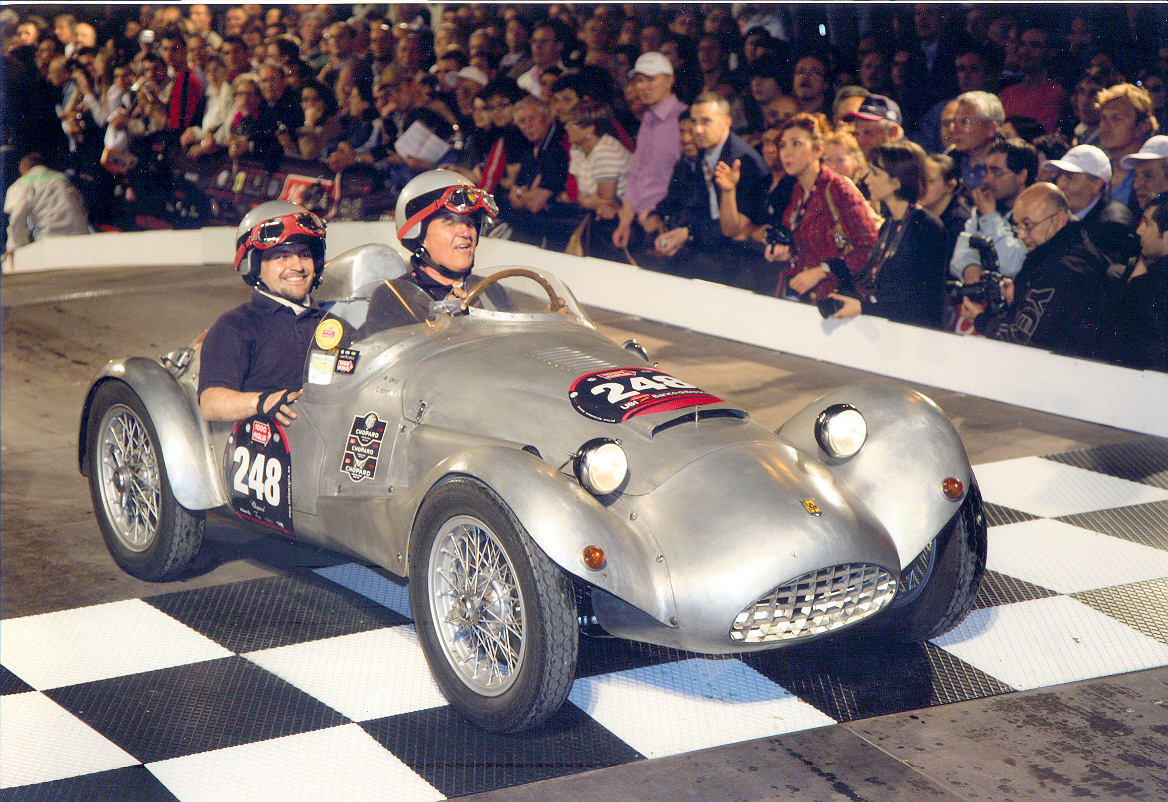 Mille Miglia 2008 Arrivo a Roma della Bandini 750 sport siluro equipaggio Bandini Orsi